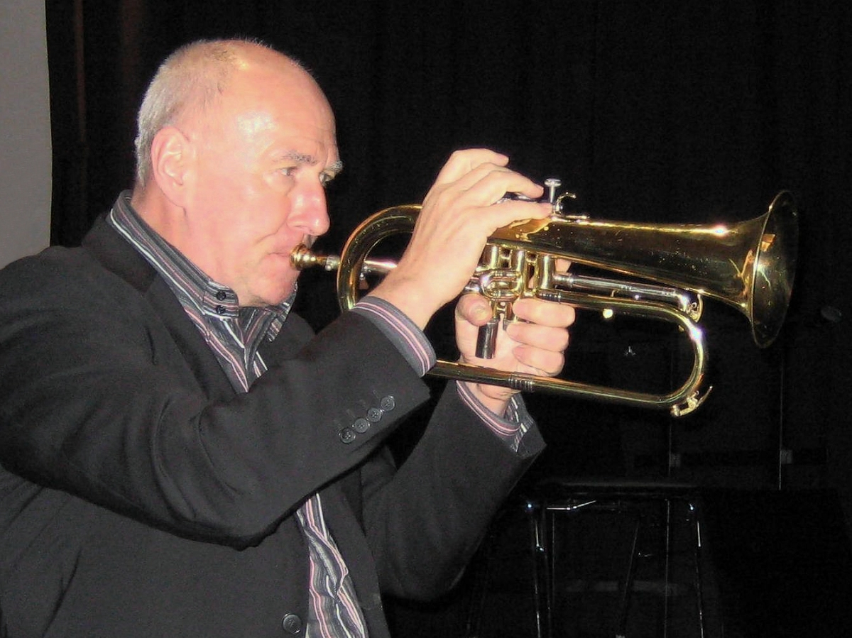 Uli Beckerhoff, deutscher Jazzmusiker, bei einer Veranstaltung (Konzert-Lesung) am 9. Mai 2009 im Haus im Park in Bremen, Deutschland